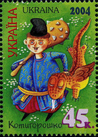 Поштова марка України. Українські народні казки. Котигорошко. Видавництво "Марка України" 2004 р.